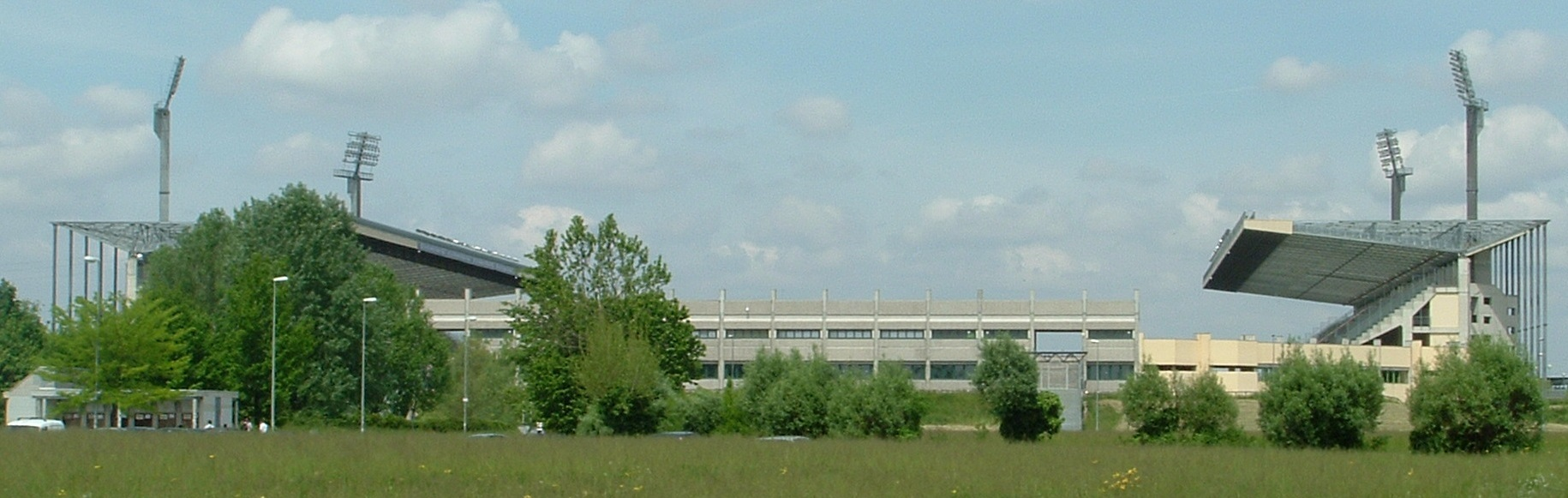 Stadium (Stadio Euganeo) of Padova Calcio / Padova FC